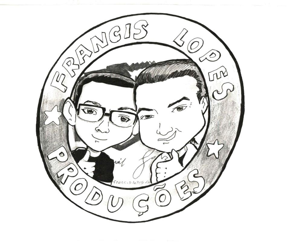 Caricatura em homenagem ao cantor Francis Lopes.